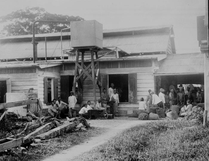 Foto. Het loon wordt bepaald voor de hoeveelheid die de plukkers meebrengen.. Het wegen van de koffie in de koffiefabriek van plantage Sorgvliet in Suriname